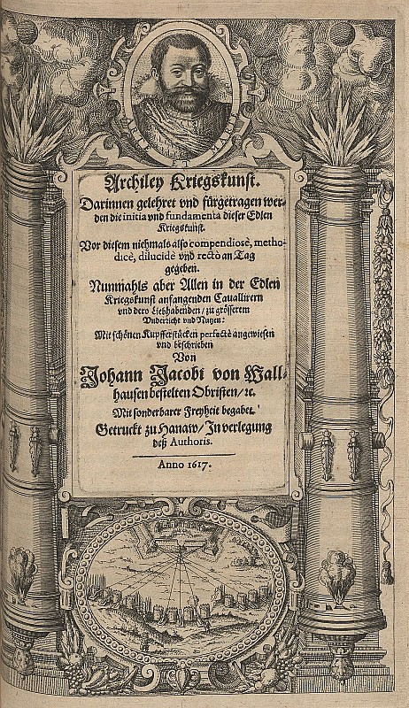 Original image description from the Deutsche Fotothek Militärwesen & Kriegskunde & Geschütz